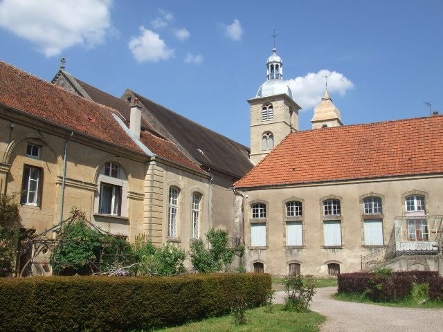 Faverney, Haute-Saône, France Église abbatiale de Faverney